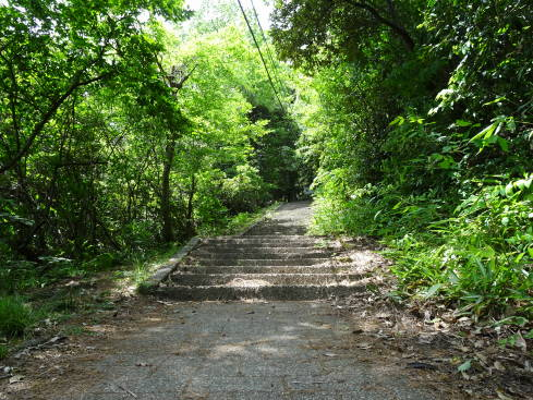 大谷坂の階段